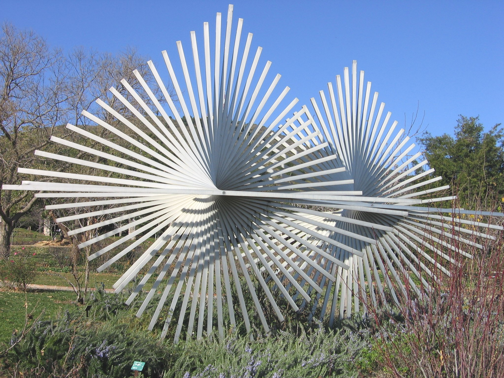 Dos rombos, de Andreu Alfaro, Parque de Cervantes, Barcelona.